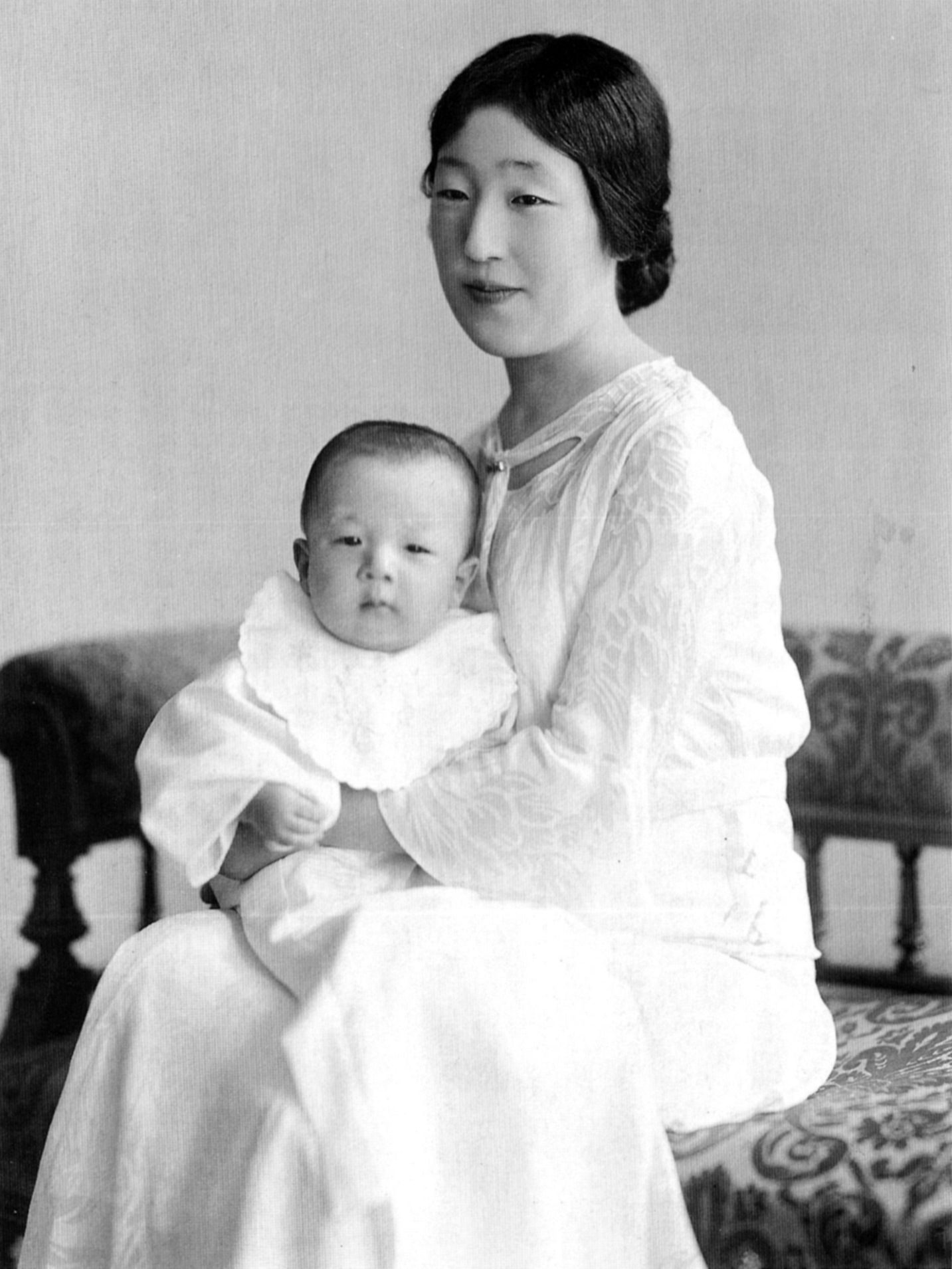 明仁親王（第125代天皇 Akihito）を抱く香淳皇后(Empress Kōjun)。